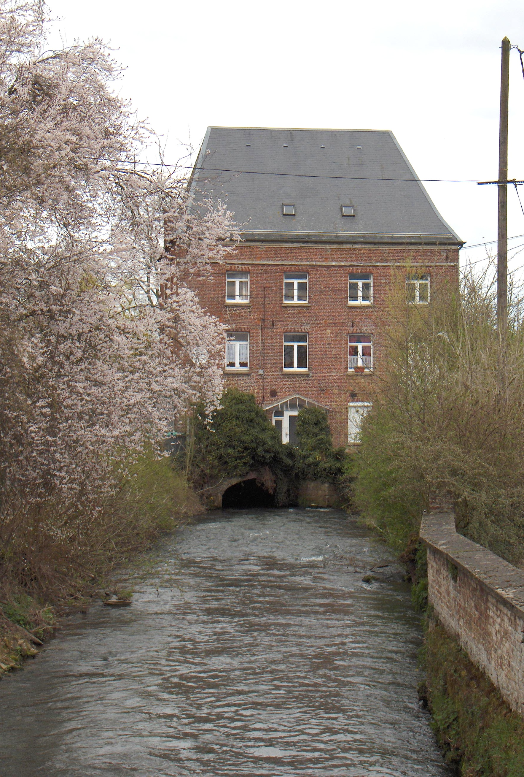 die Lys (frz.)/Leie (nl.) in Thérouanne, stromabwärts.